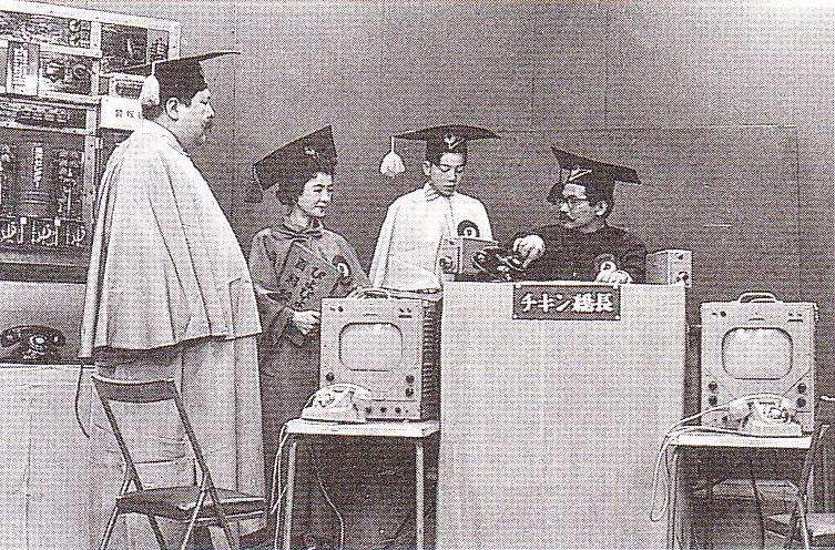 日本のテレビ番組『テレビぴよぴよ大学』（1956年 - 1960年、当時のラジオ東京テレビジョンで放送）のスタジオ風景（2002年1月、後身の東京放送から発行された『TBS50年史』100ページに掲載）。